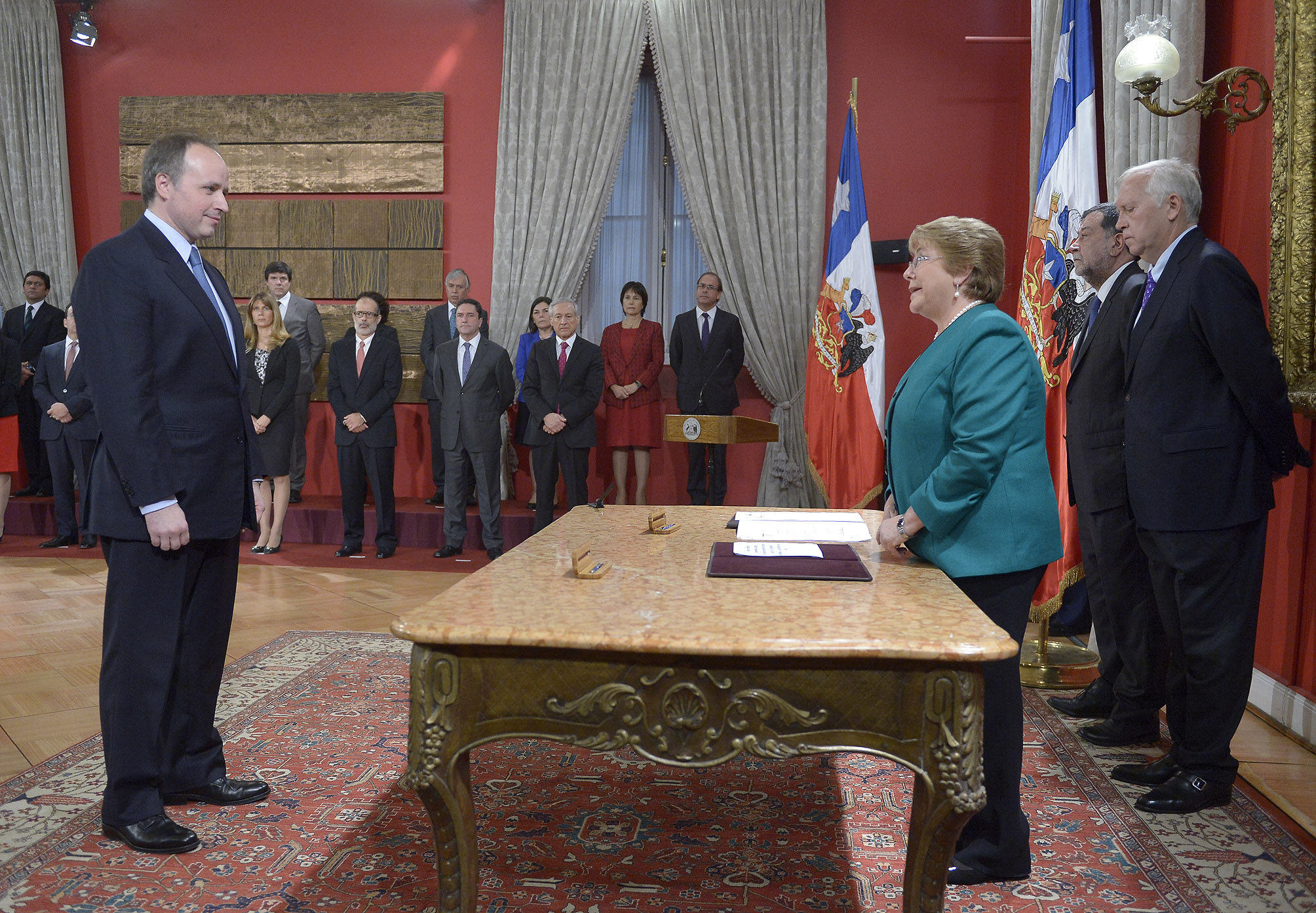 11/05/15 Cambio de Gabinete, Asume Ministro Marcelo Diaz.